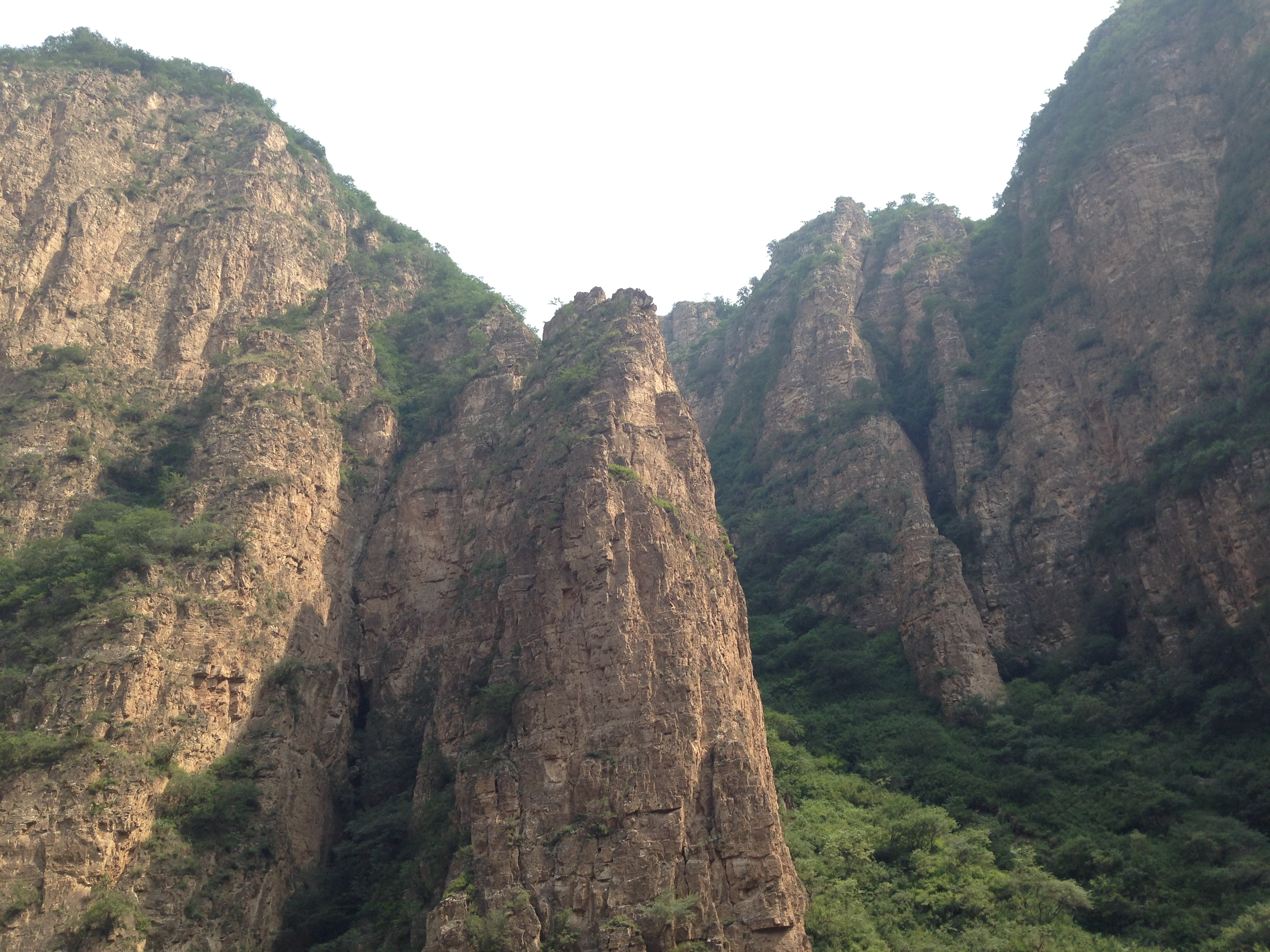 Yuxian, Zhangjiakou, Hebei, China